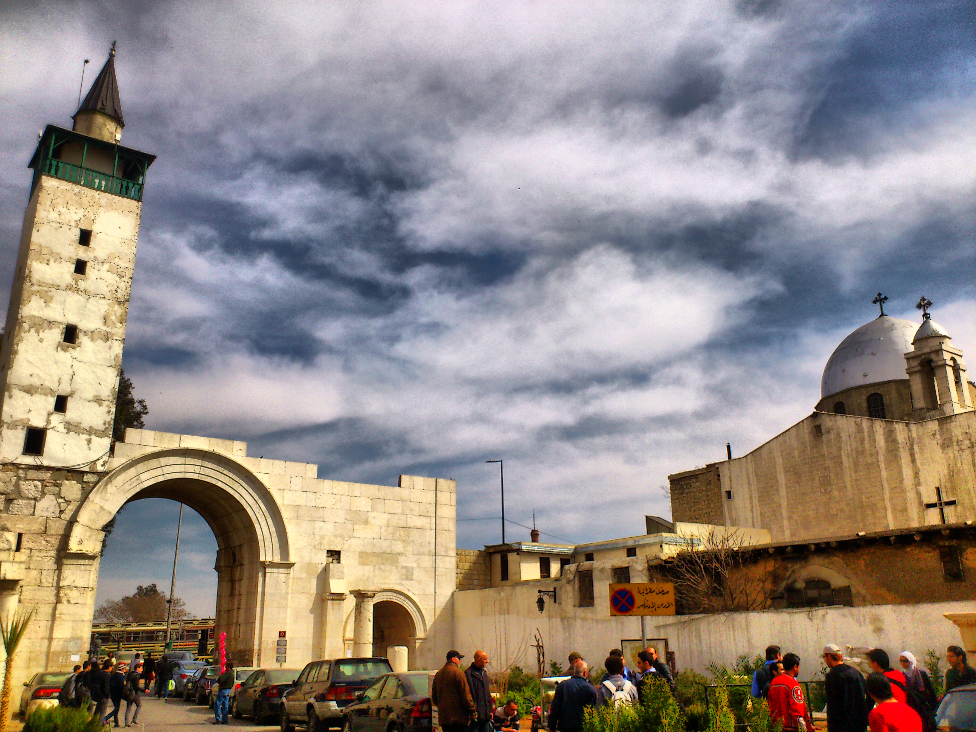 باب شرقي